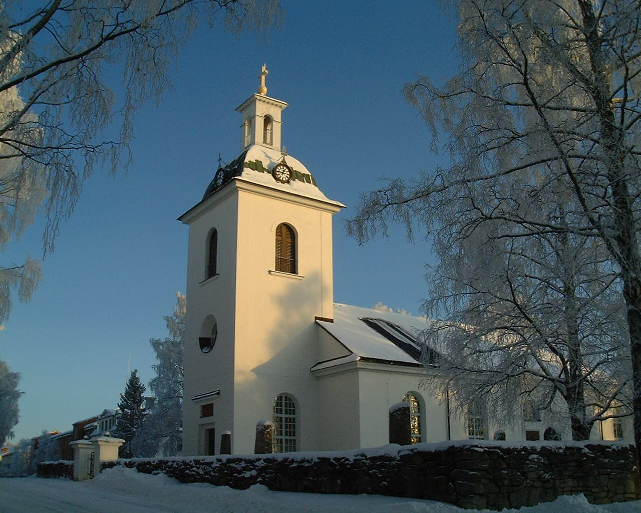 Ströms kyrka, Strömsund, Jämtland